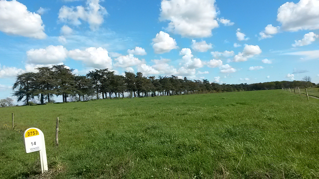 Allée de cèdres de Meslay, à la Guyonnière (fr-85) vue de la route D23 de Montaigu à Treize-Septiers